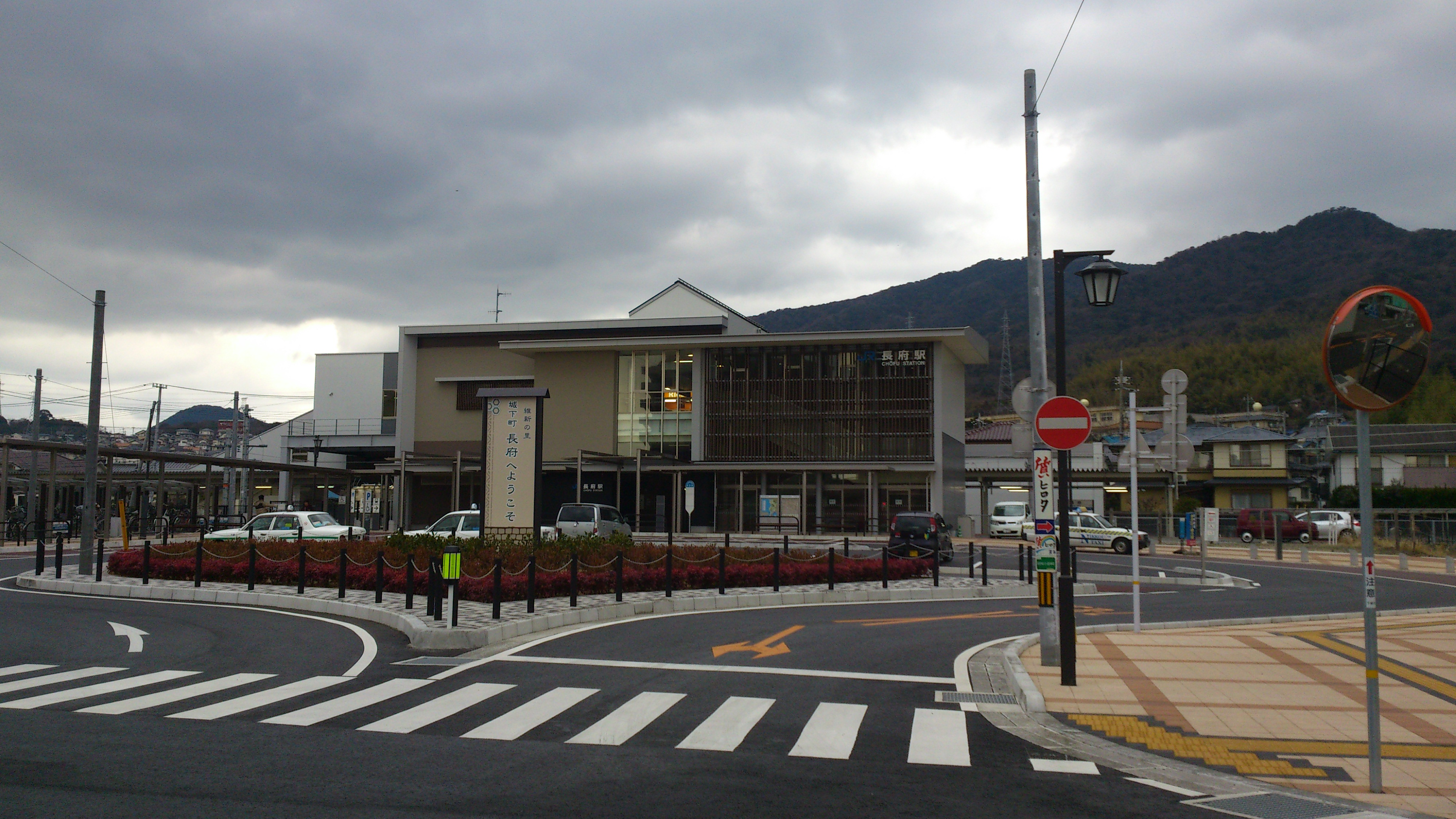 橋上駅へ改築が完了した長府駅駅舎と駅前広場。（2013年1月）